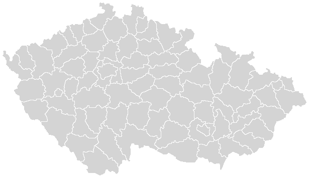 Mapka českých okresů v letech 1996-2004